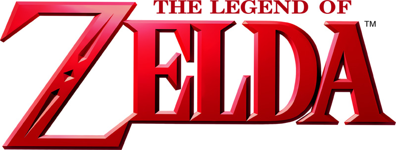 Im April 2013 in einer Nintendo Direct-Ausstrahlung präsentiertes Logo zu The Legend of Zelda: A Link Between Worlds, damals nur als The Legend of Zelda bezeichnet.